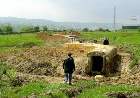 Arquitectura militar de la guerra civil española. Complejo fortificado de Matalablima, Oviedo. Principado de Asturias